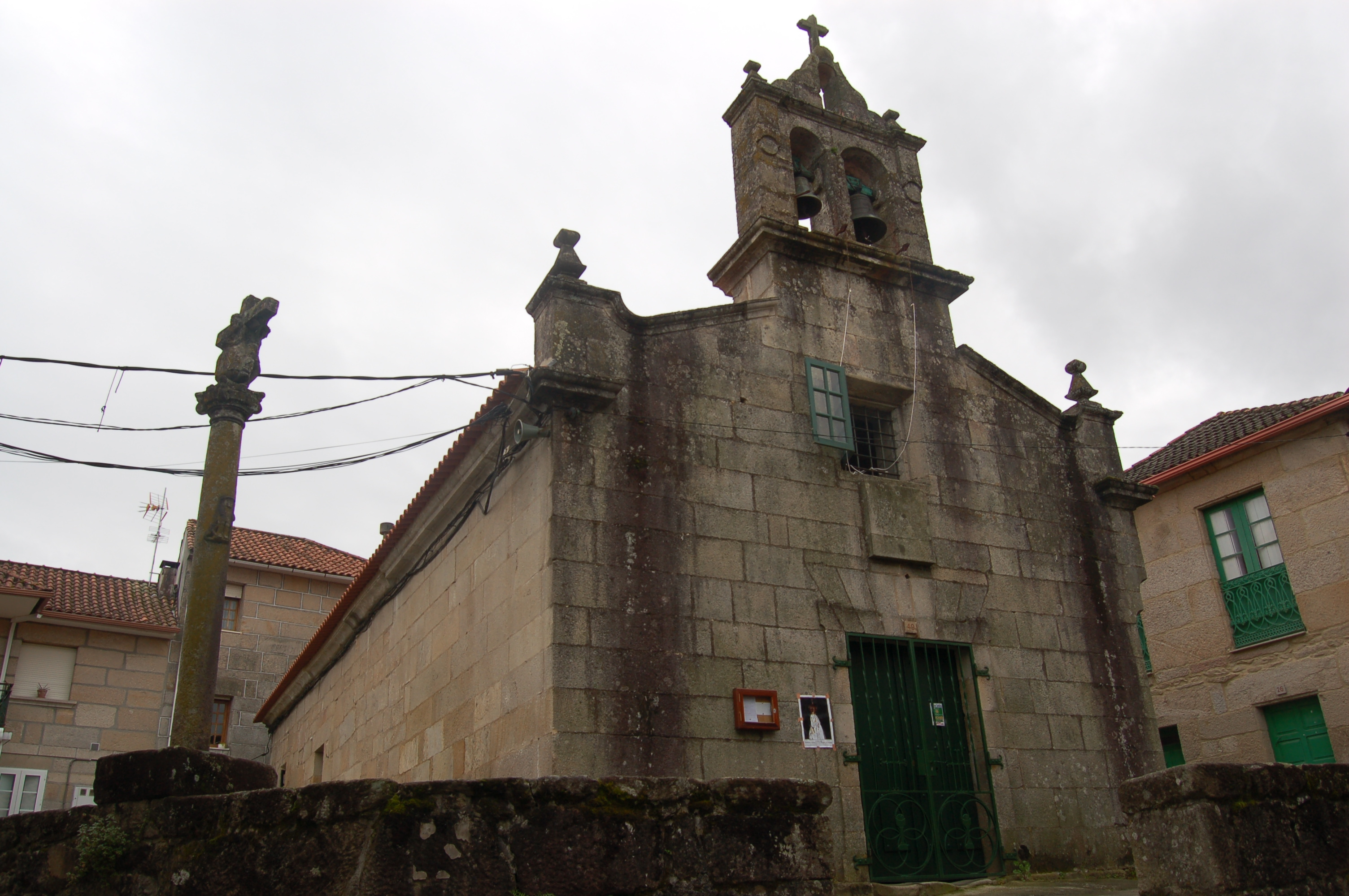 Igrexa parroquial de San Roque de Combarro (Poio)